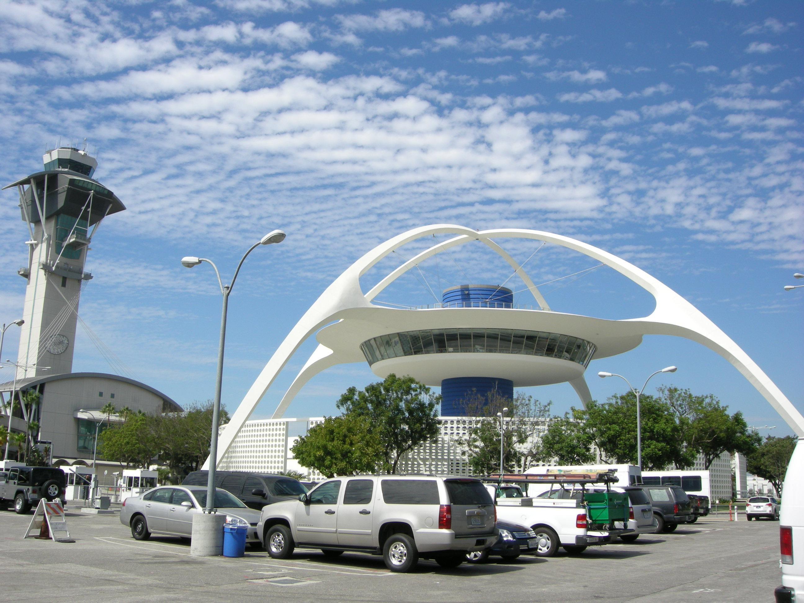 LAX